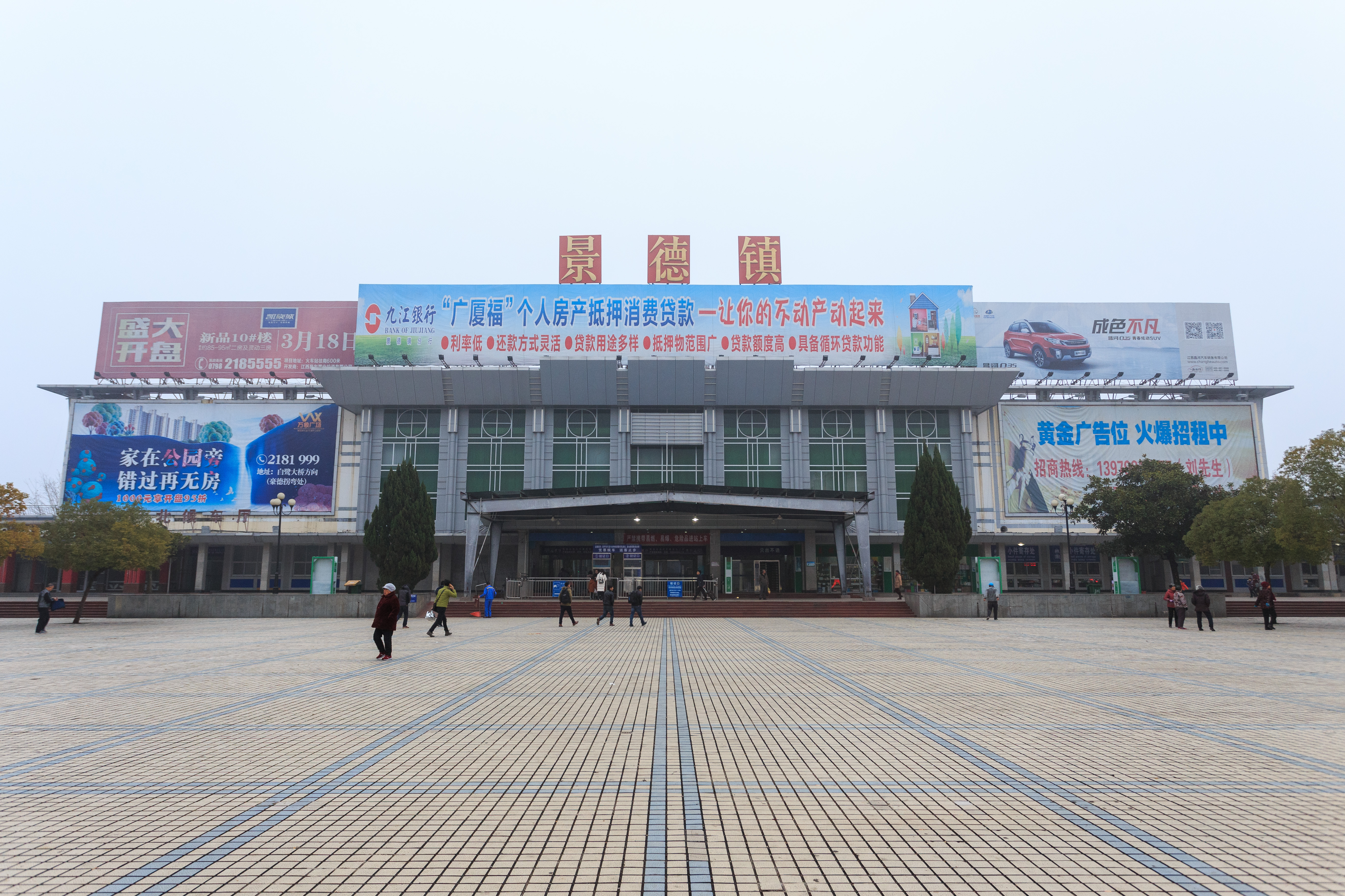 景德镇站